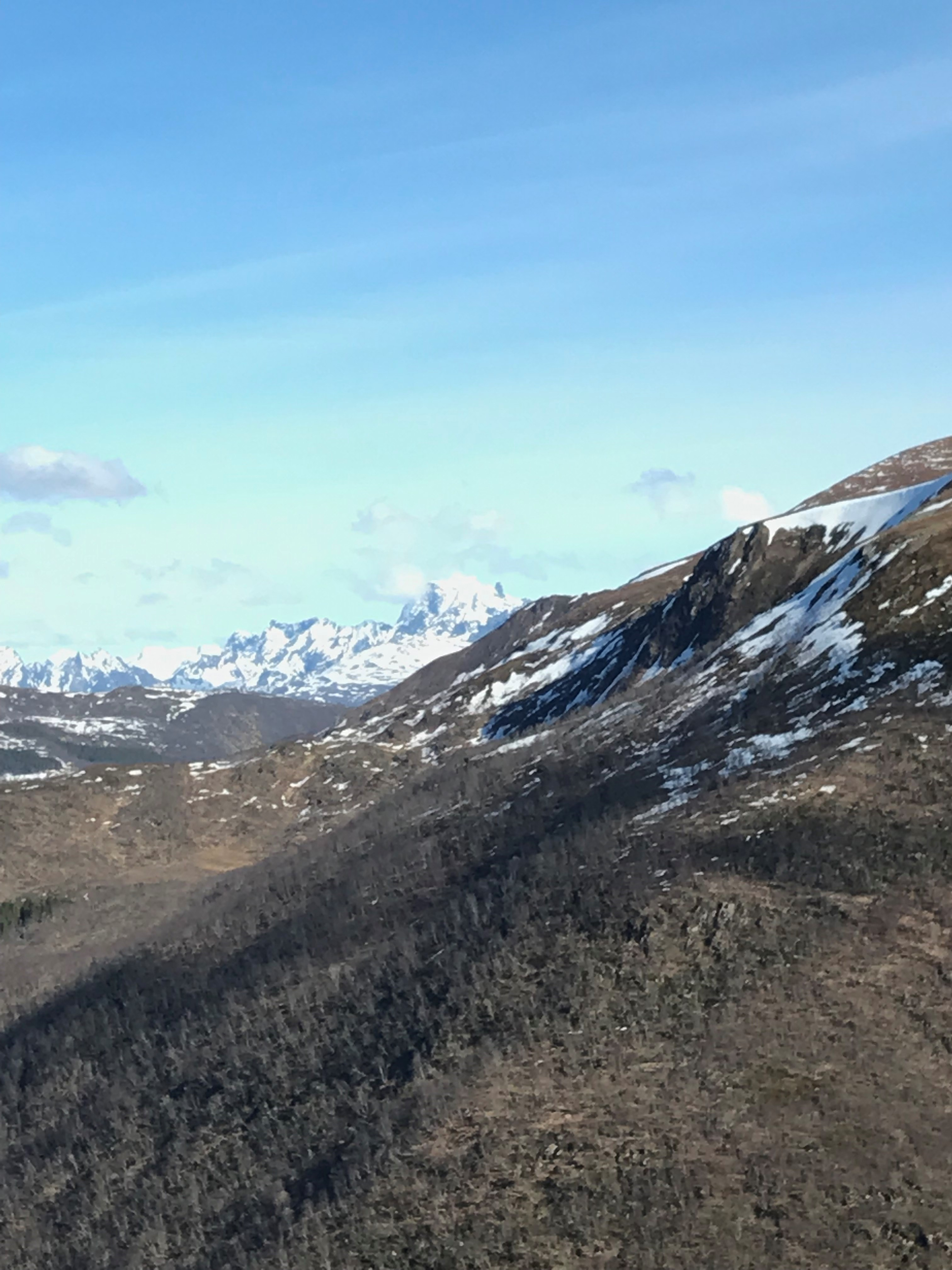 comeon